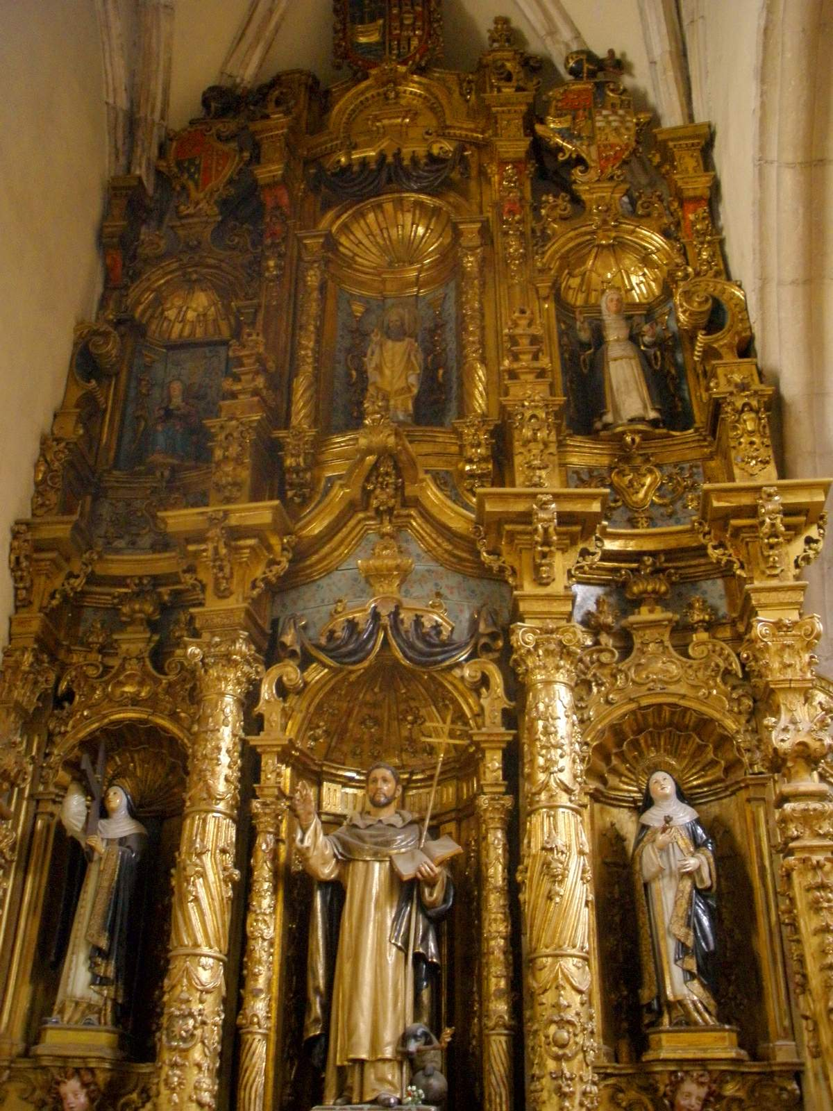 Oviedo - Iglesia del Convento de Santo Domingo